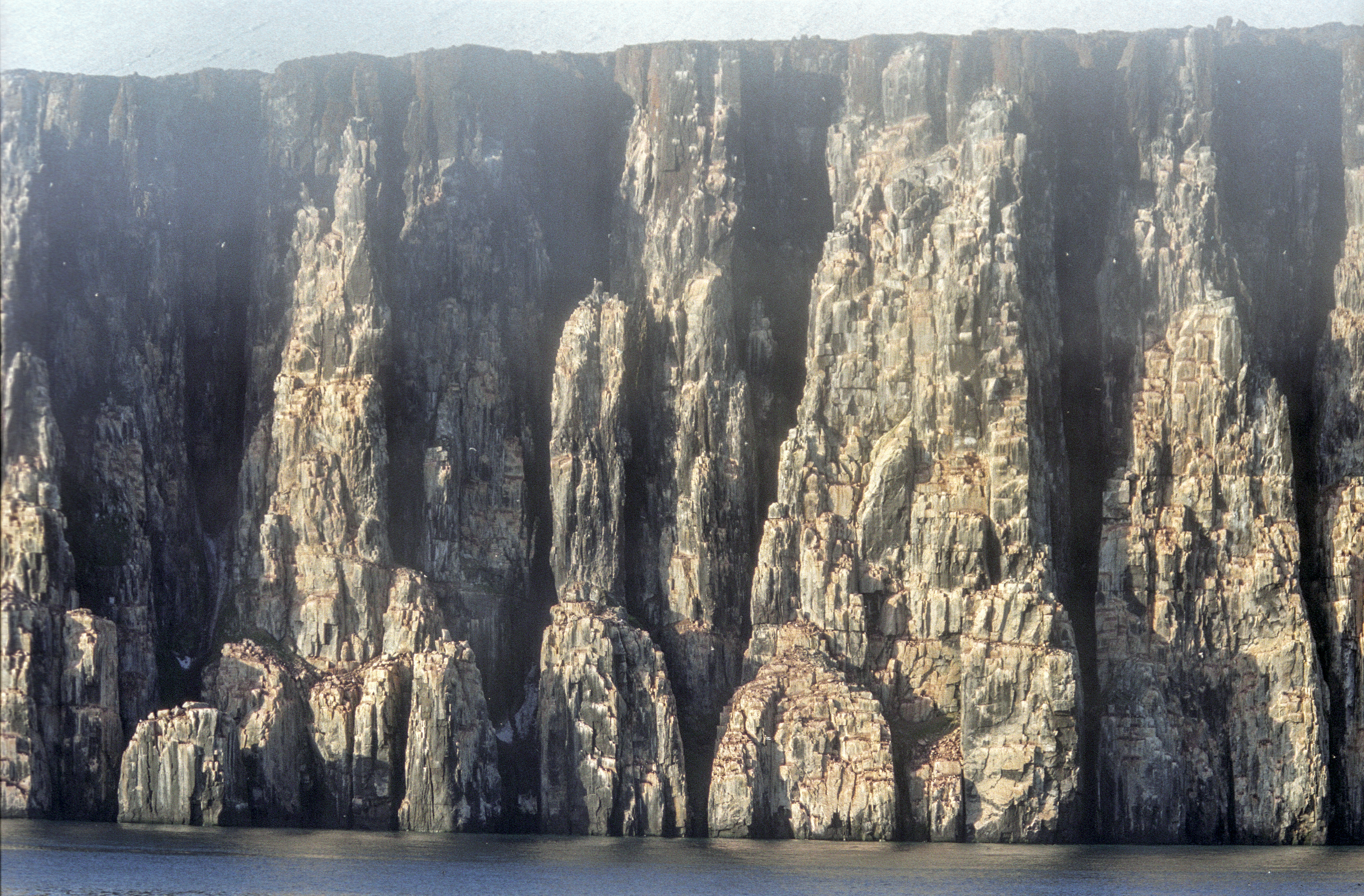 Spitsbergen, Alkefjellet